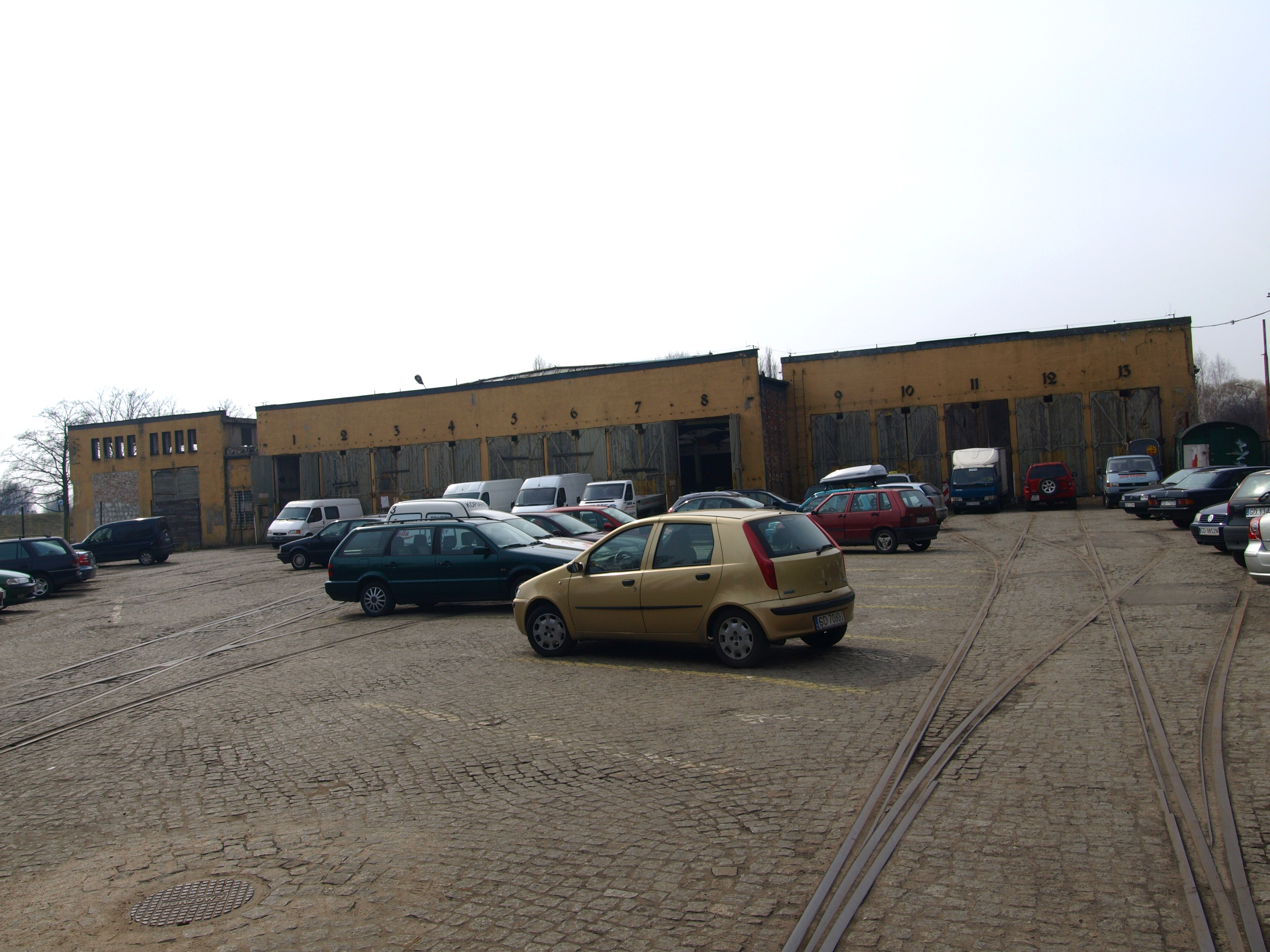 Dawna zajezdnia tramwajowa w Gdańsku, na Dolnym Mieście.